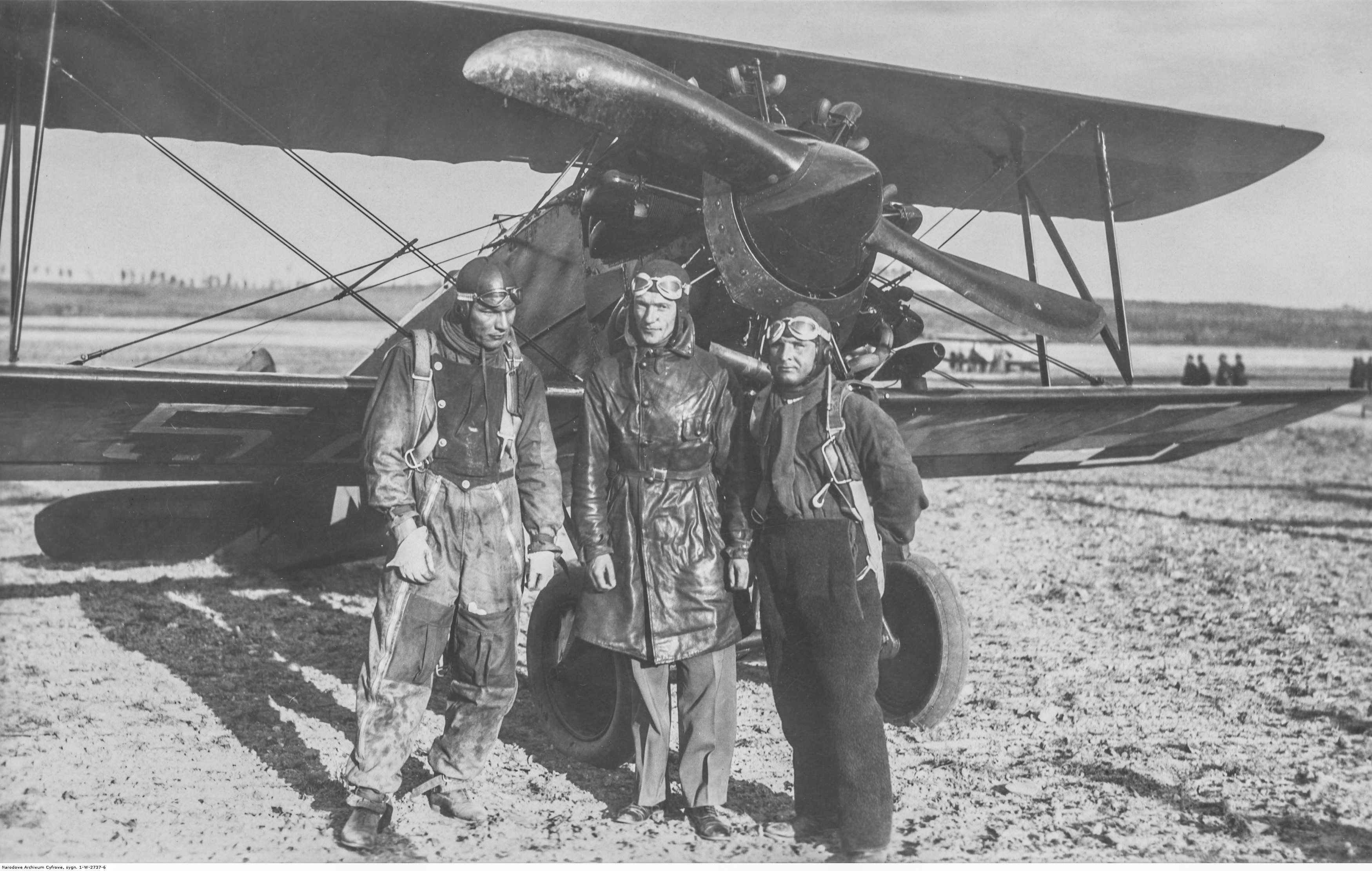 Tydzień Ligi Obrony Powietrznej i Przeciwgazowej w Katowicach. Piloci z tzw. "trójki Bajana" przed samolotem Avia BH-33 (PWS-A). Od lewej: por. Bronisław Kosiński, kpr. Karol Pniak, kpr. Stanisław Macek. Koncern Ilustrowany Kurier Codzienny - Archiwum Ilustracji. Sygnatura: 1-W-2737-6